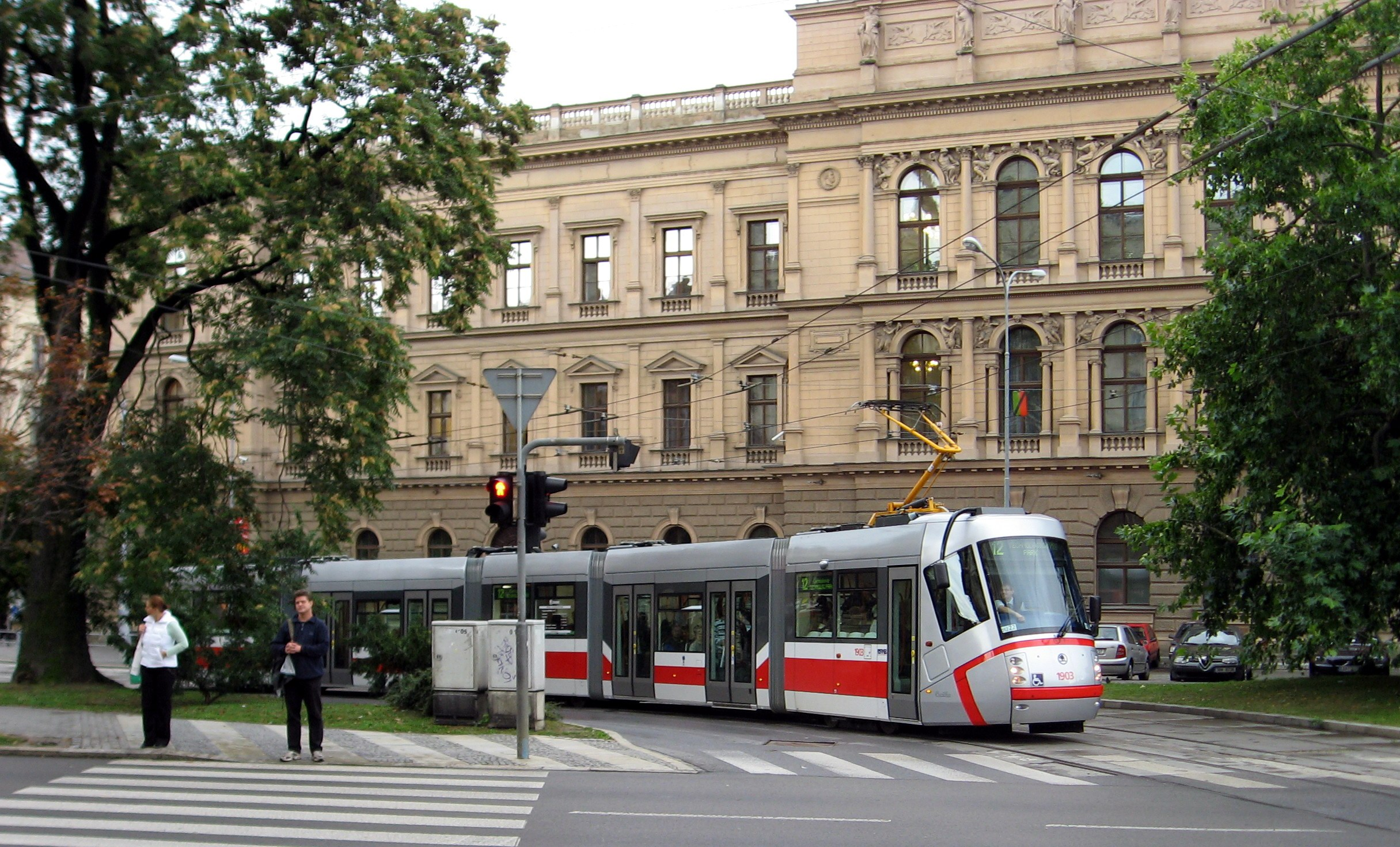 Šalina jedoucí od České